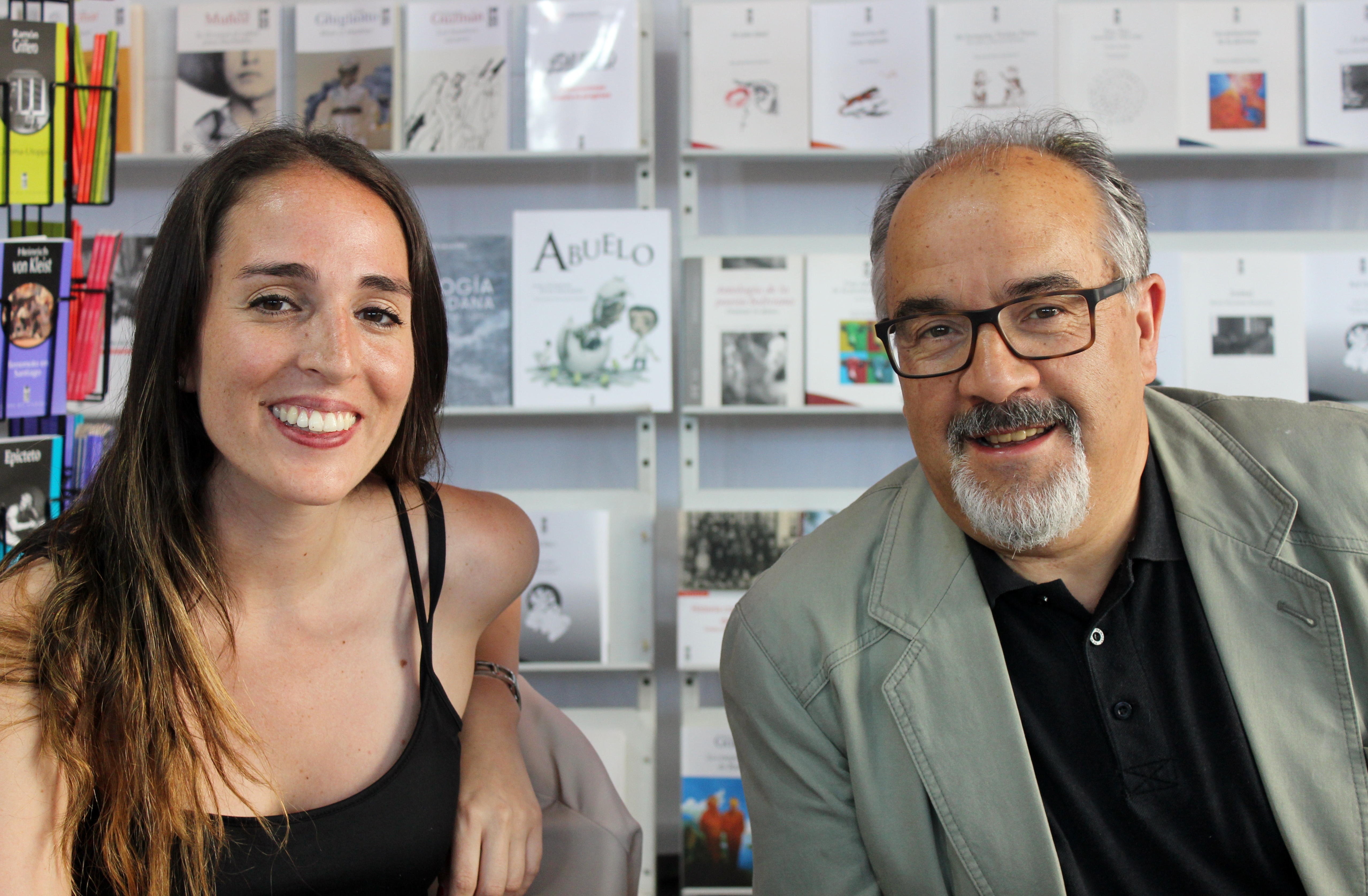 La escritora chilena Montserrat MartorellMontserrat Martorell y Ramón Díaz Eterovic en el stand de LOM durante una sesión de firmas en la Feria Internacional del Libro de Santiago 2018.